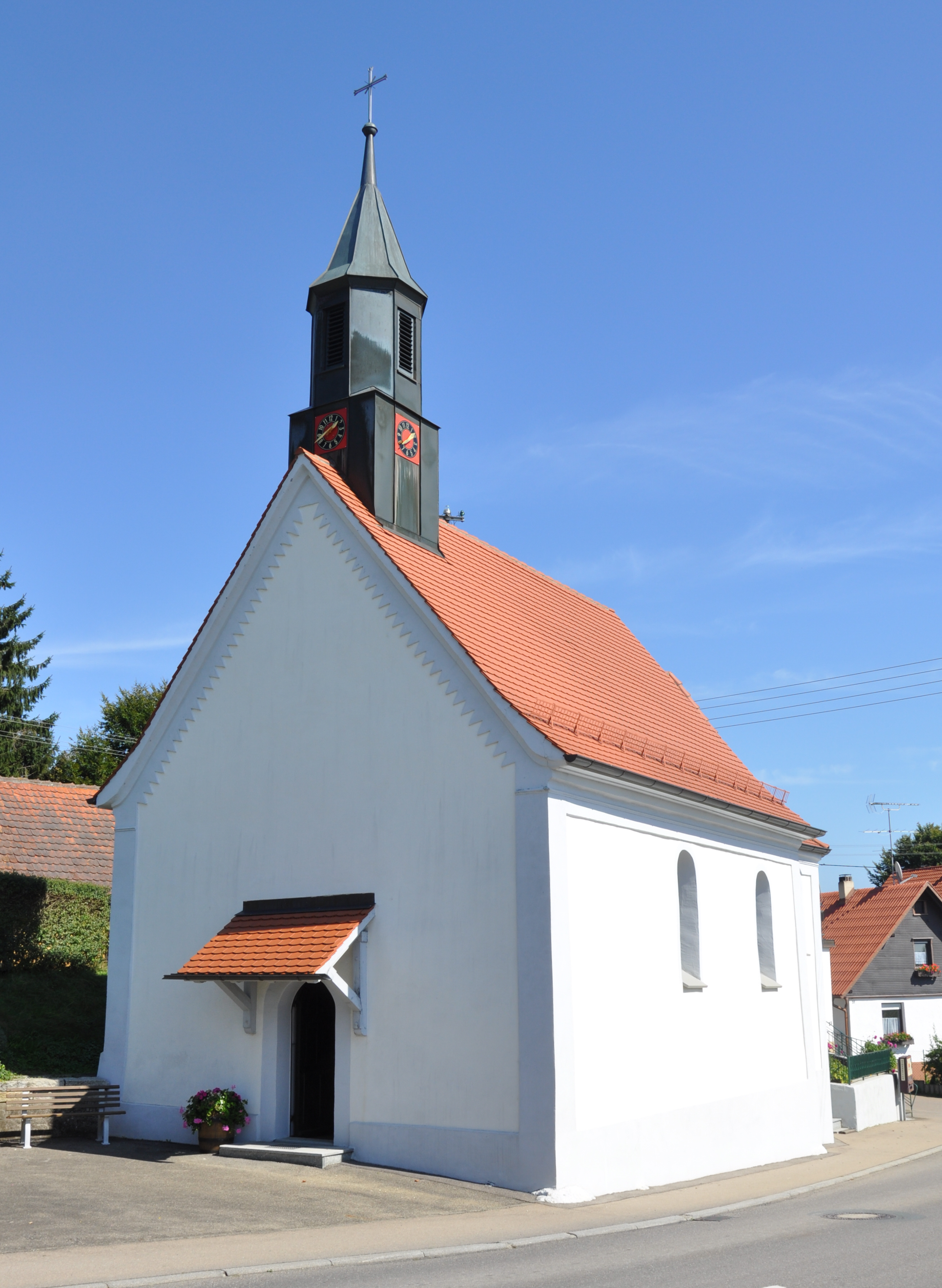 Hippetsweiler, Gemeinde Wald, Landkreis Sigmaringen; Kapelle St. Wolfgang